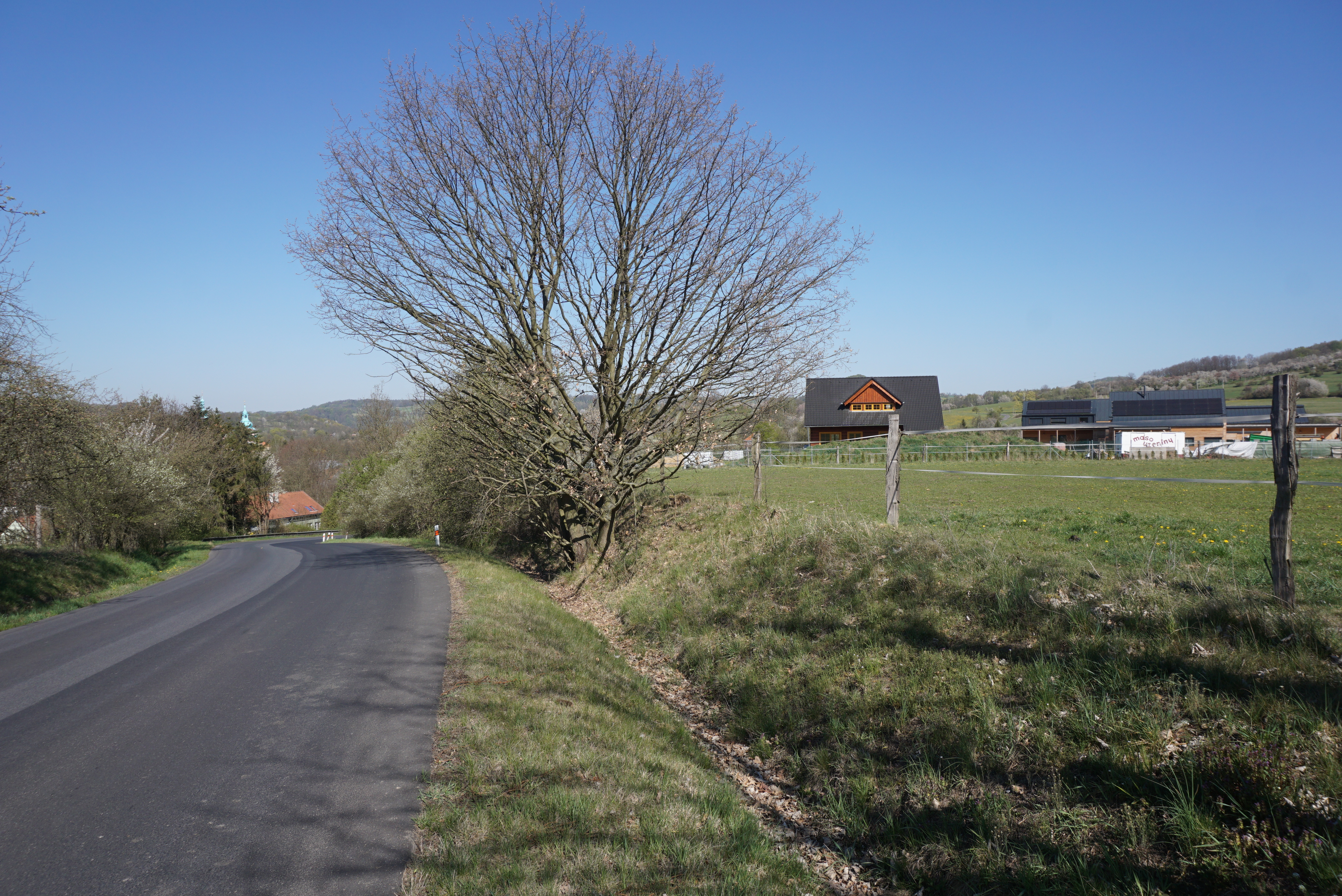 Horní Police - místní část Na Výšině